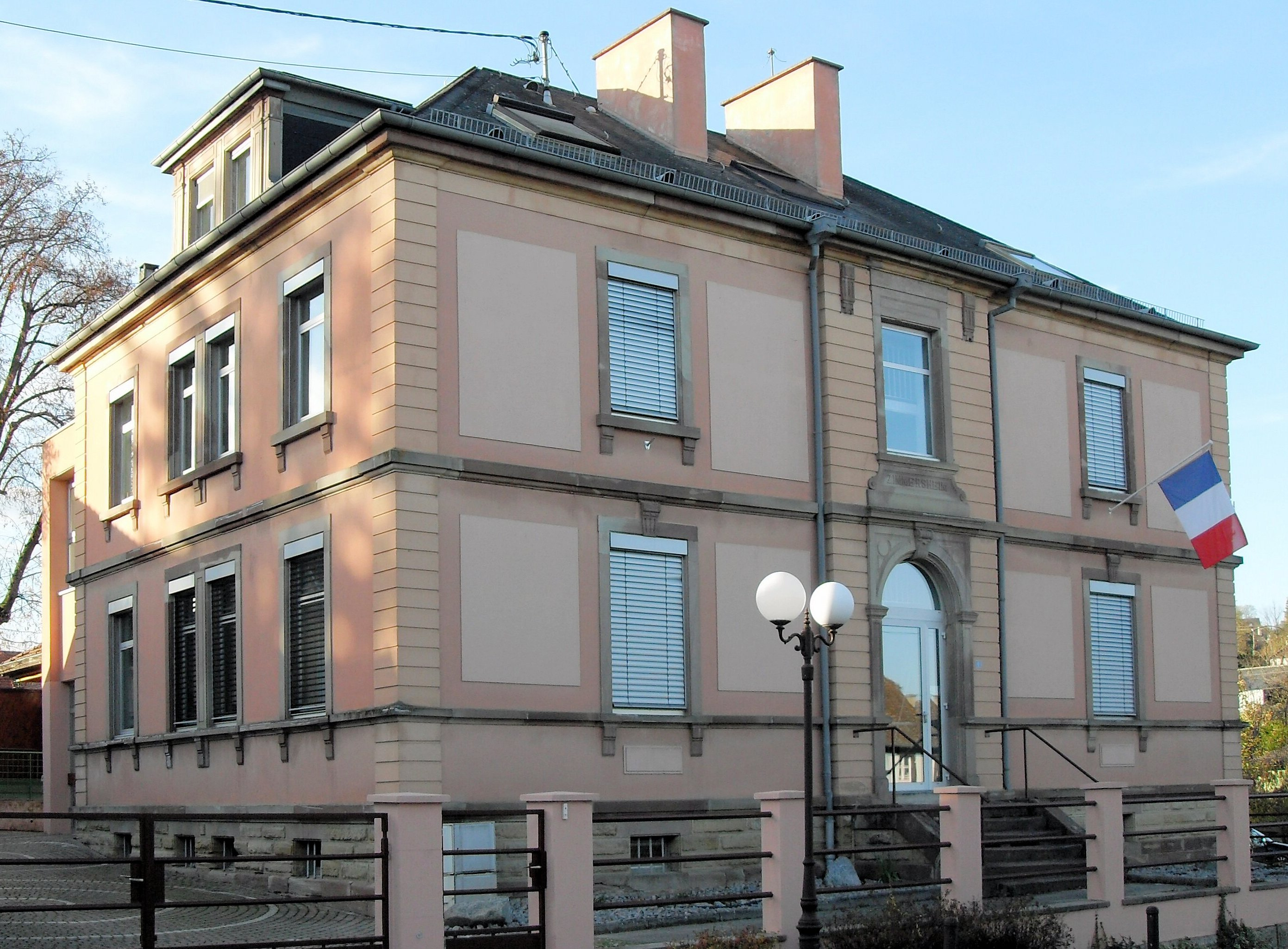 La mairie-école de Zimmersheim